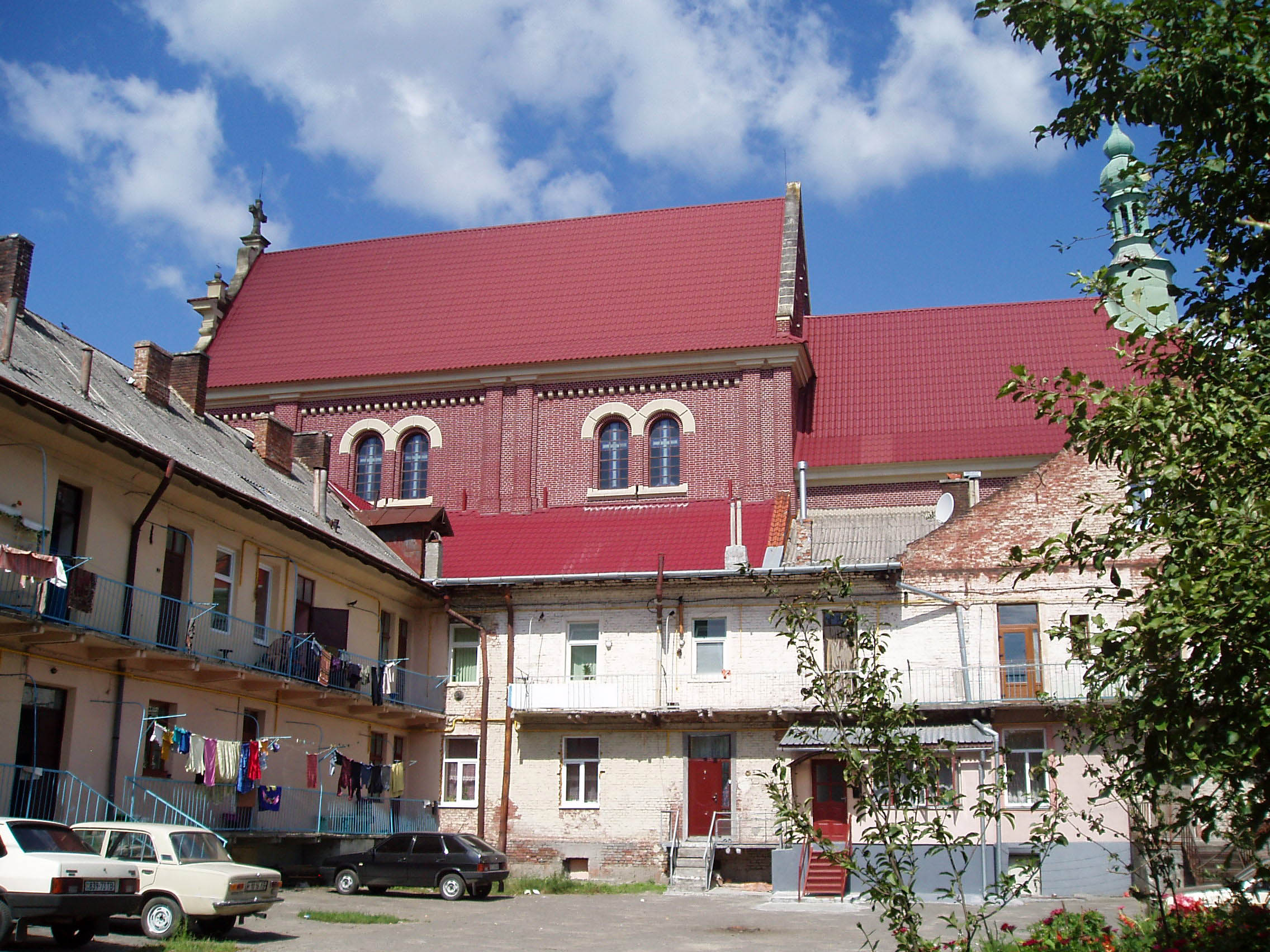 Церква священномученика Йосафата у Львові на вулиці Замарстинівській, 134. Архітектор Ян Кароль Зубжицький.